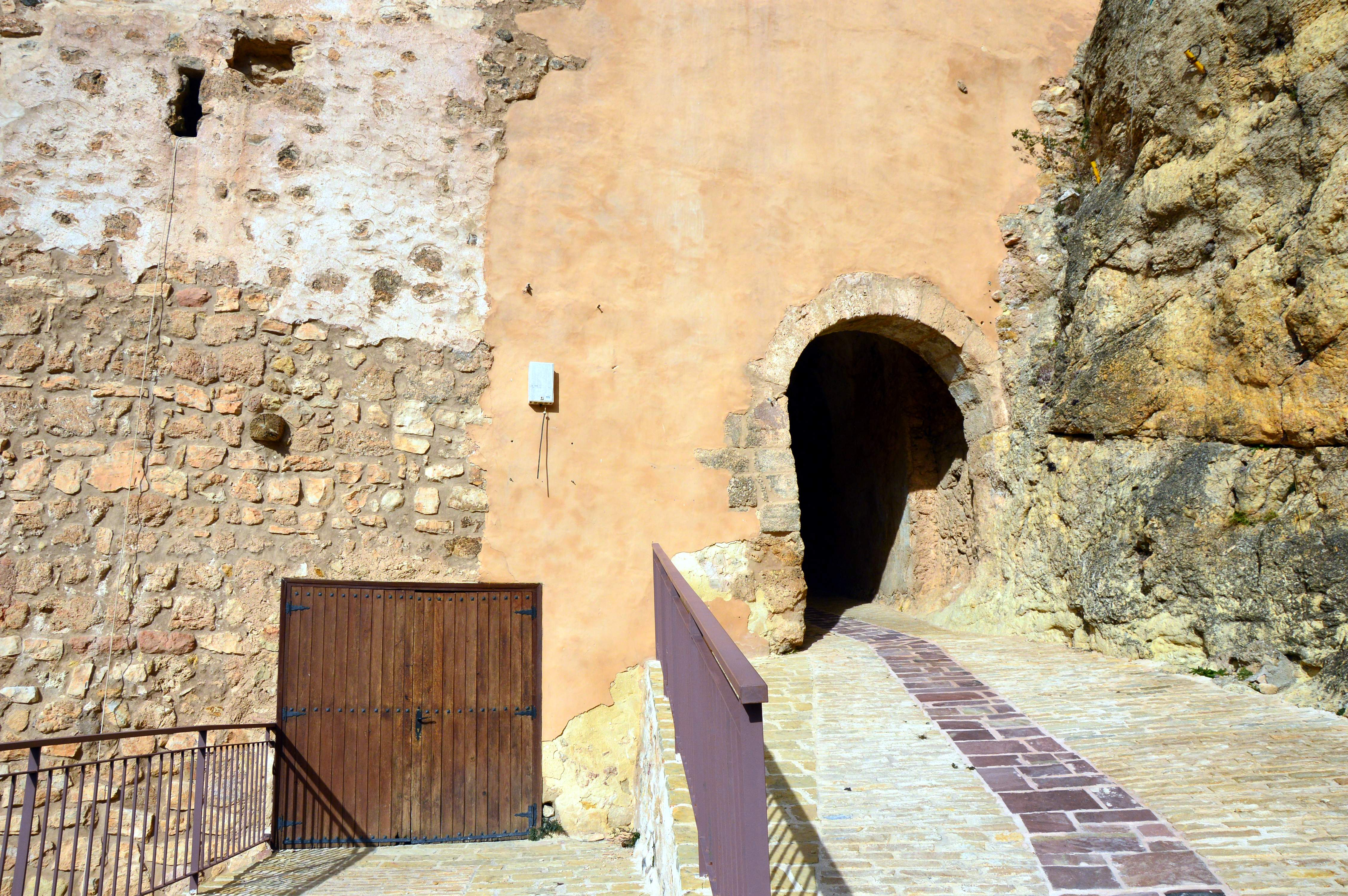 Detalle de la entrada al Carrerón (derecha) en el torreón donde se halla la Iglesia-fortaleza de Castielfabib (Valencia), 2019.